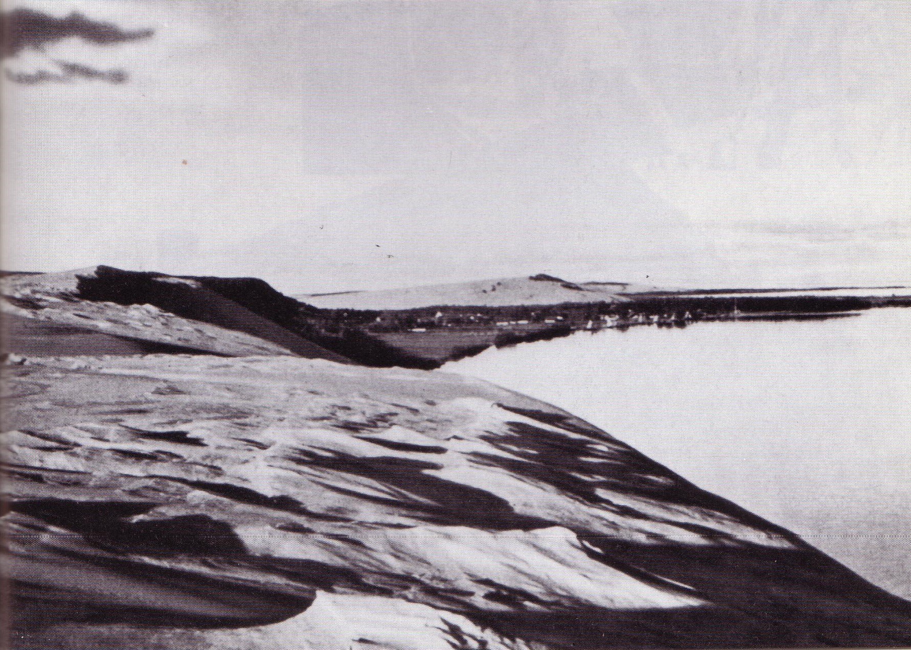 Alte Fotografie der Wanderdüne bei Pillkoppen auf der Kurischen Nehrung